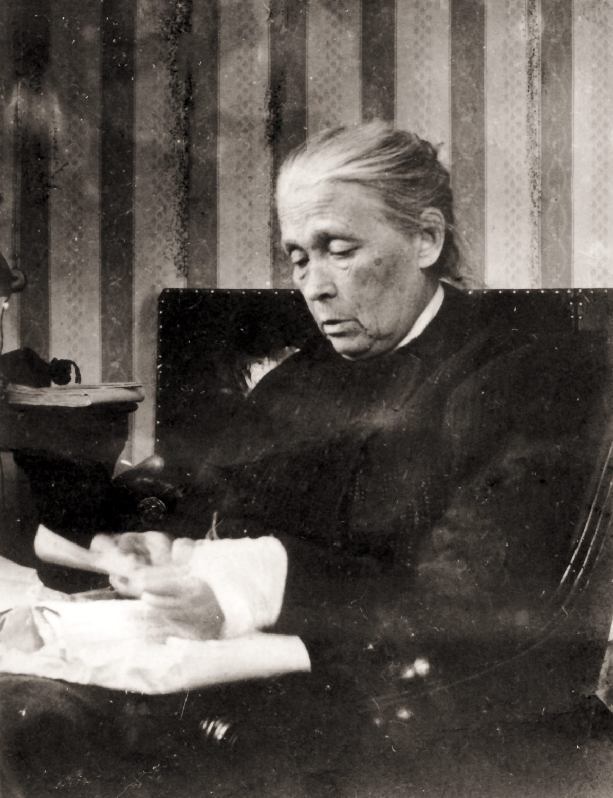 Praskov'ja Semënovna Ivanovskaja